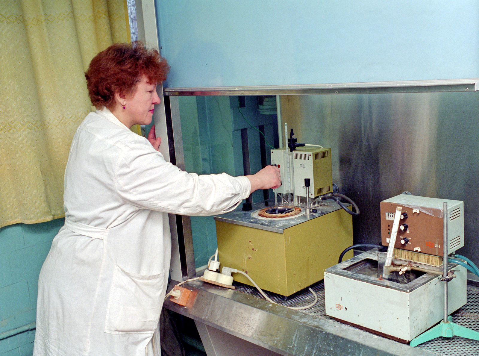 Производство эталонных растворов в Научно-исследовательском фототехническом институте ОАО «Компании Славич» (НИФТИ) на участке производства стандарт-титров. Елена Александровна Киселёва измеряет температуру в термостате. На столе стоят два термостата.